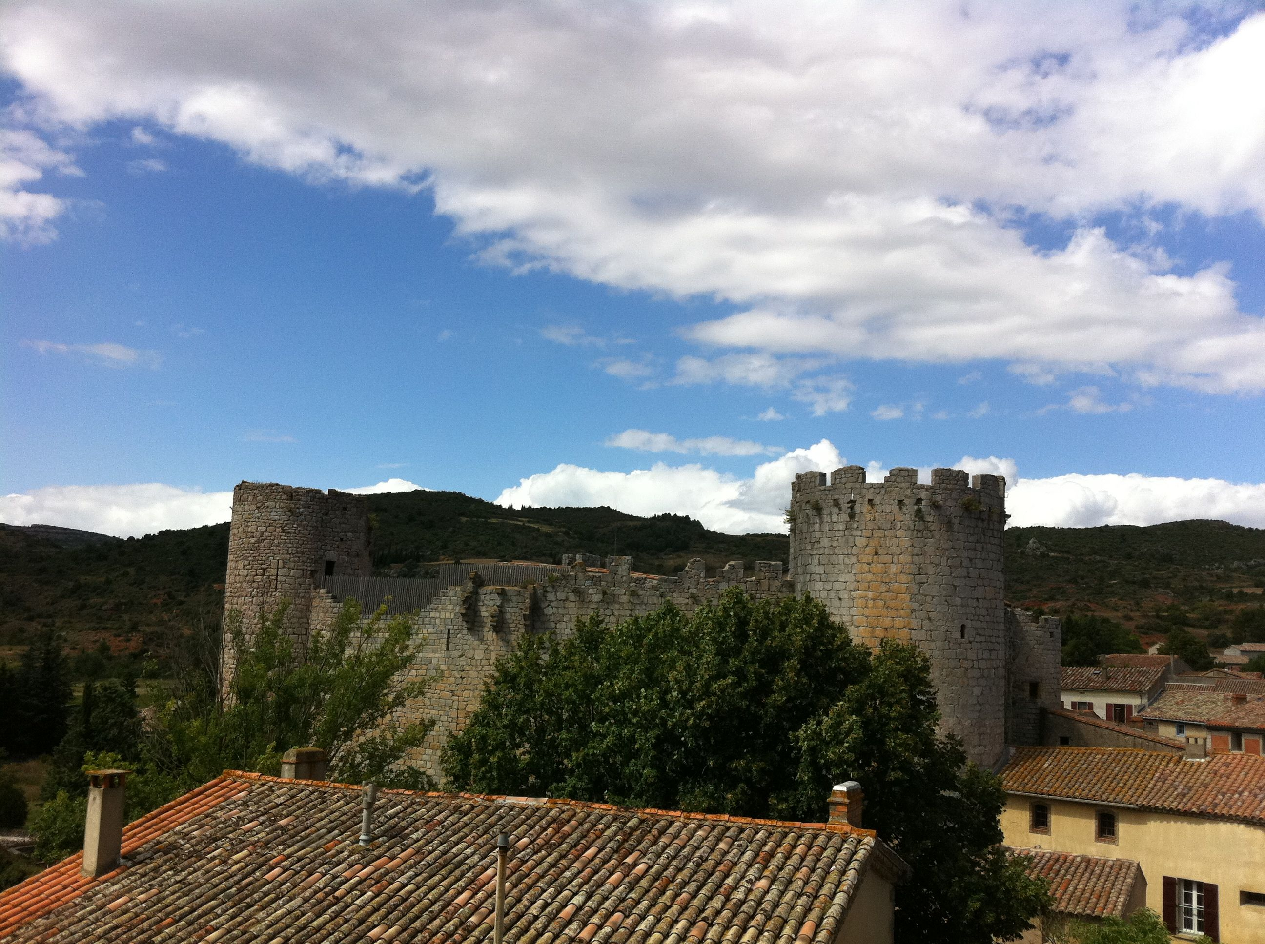 Château du Pays Cathare, massif des Corbières, Villerouge-Termenès, Aude, France